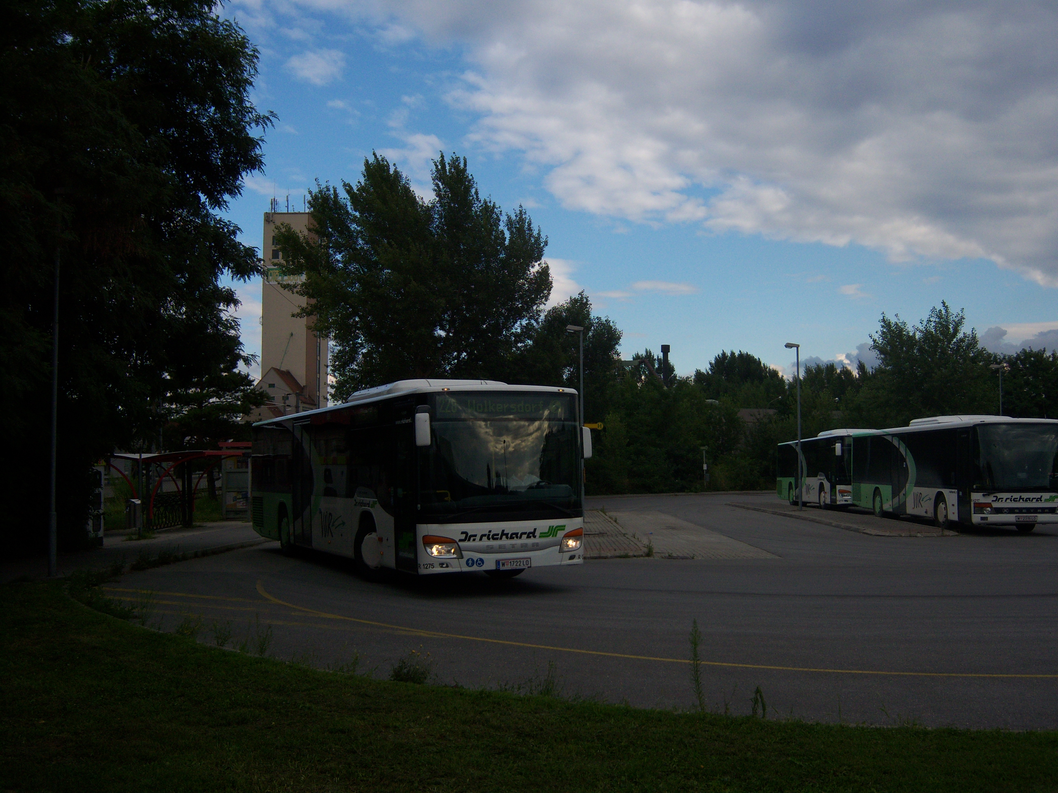 Regionalbus 228 im Busbahnhof Wolkersdorf